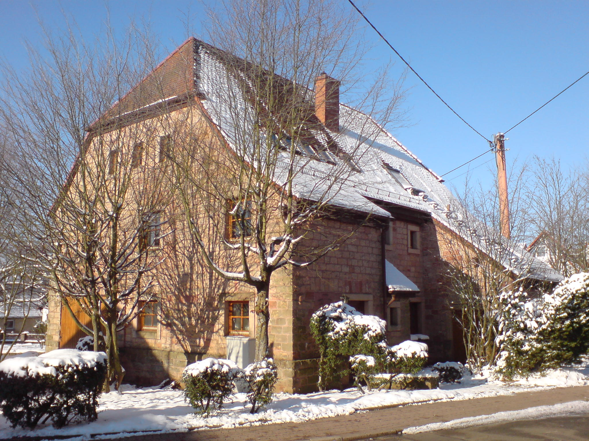 Das Wanderheim Faselstall in Trippstadt.